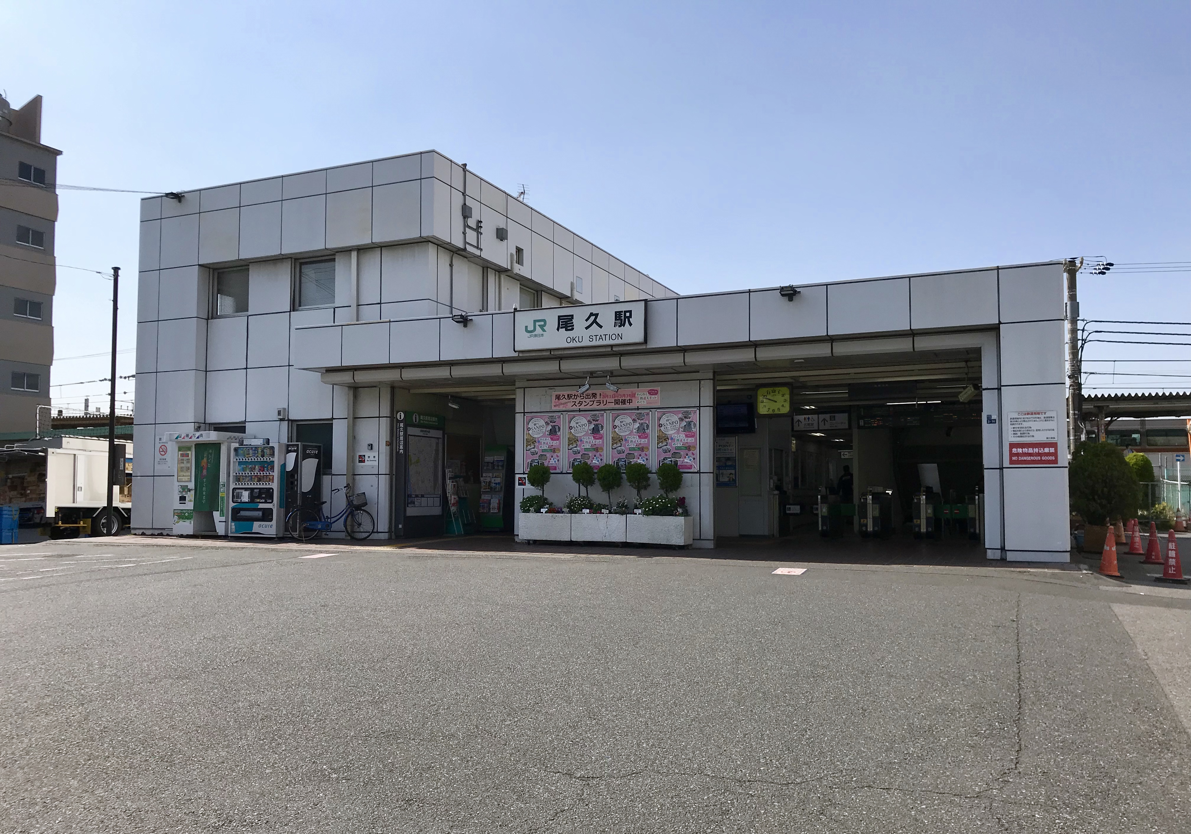 JR東日本東北本線尾久駅駅舎